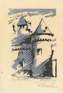 chateau d'aubenas